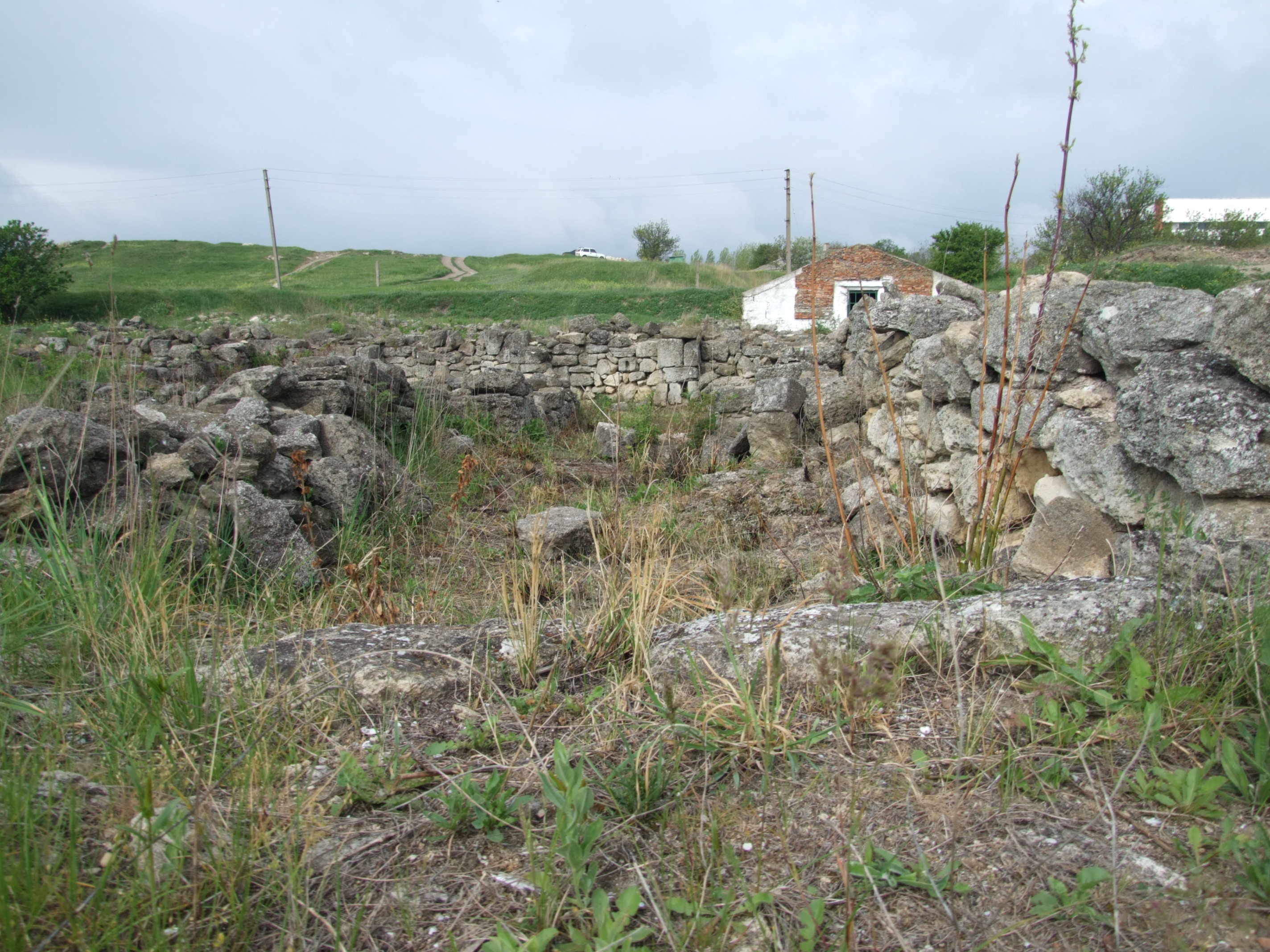 Археологічний комплекс «Стародавнє місто Мірмекій»